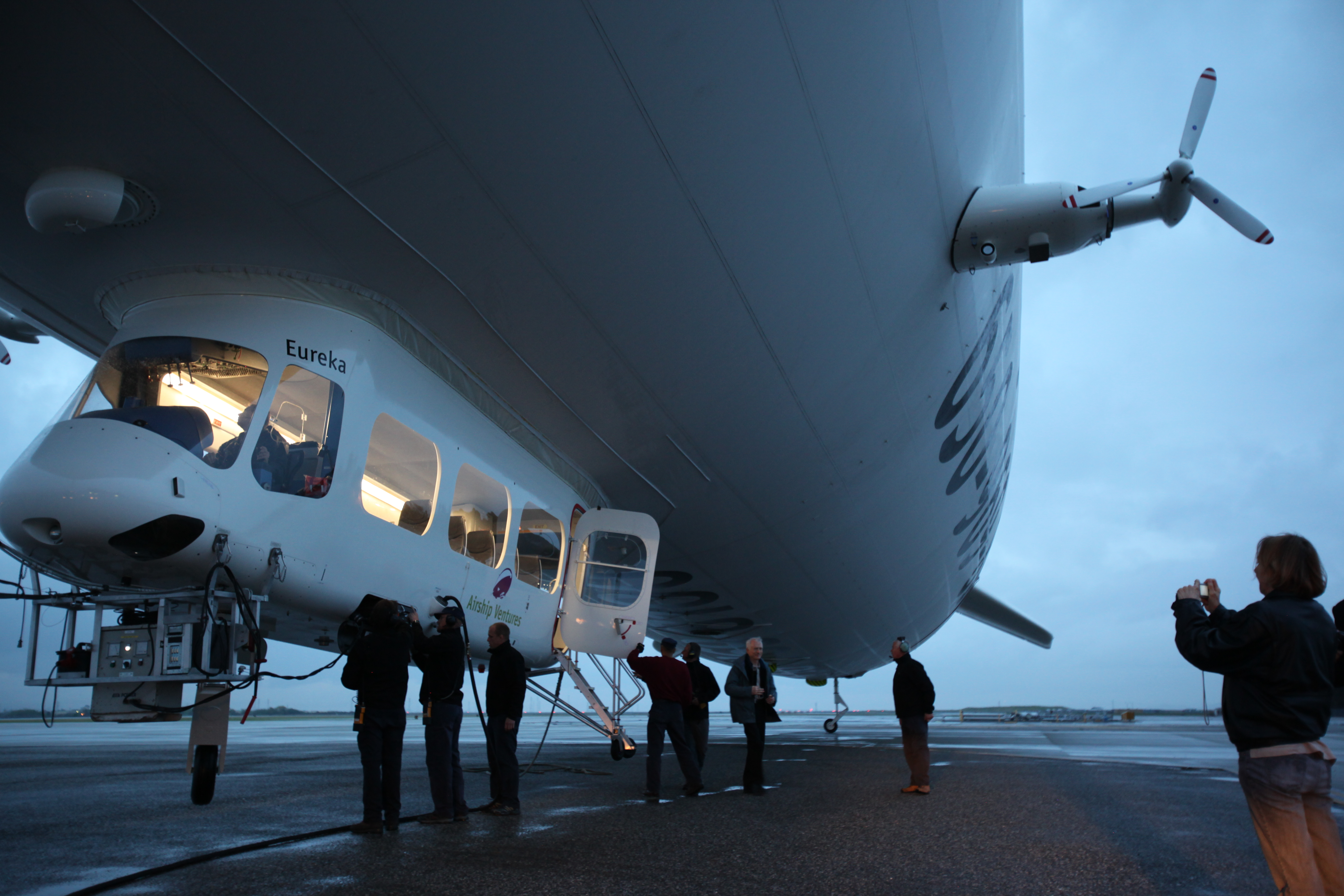 der in Kalifornien eingestetze Zeppelin NT